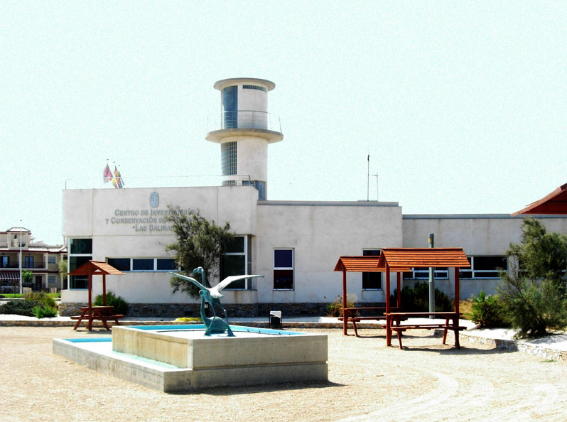 Centro de conservación de las salinas de San Pedro del Pinatar. Este centro se encarga de realizar investigaciones sobre los humedales del Mar Menor y de proponer medidas para su conservación. Se encuentra situado a la entrada del parque natural de las Salinas y Arenales de San Pedro del Pinatar. Además de su función investigadora organiza visitas de grupos escolares y público en general al parque natural y cuenta con salas de exposiciones en las que se encuentran paneles didácticos sobre humedales y trabajo en las salinas. Este centro se creó en 2002.